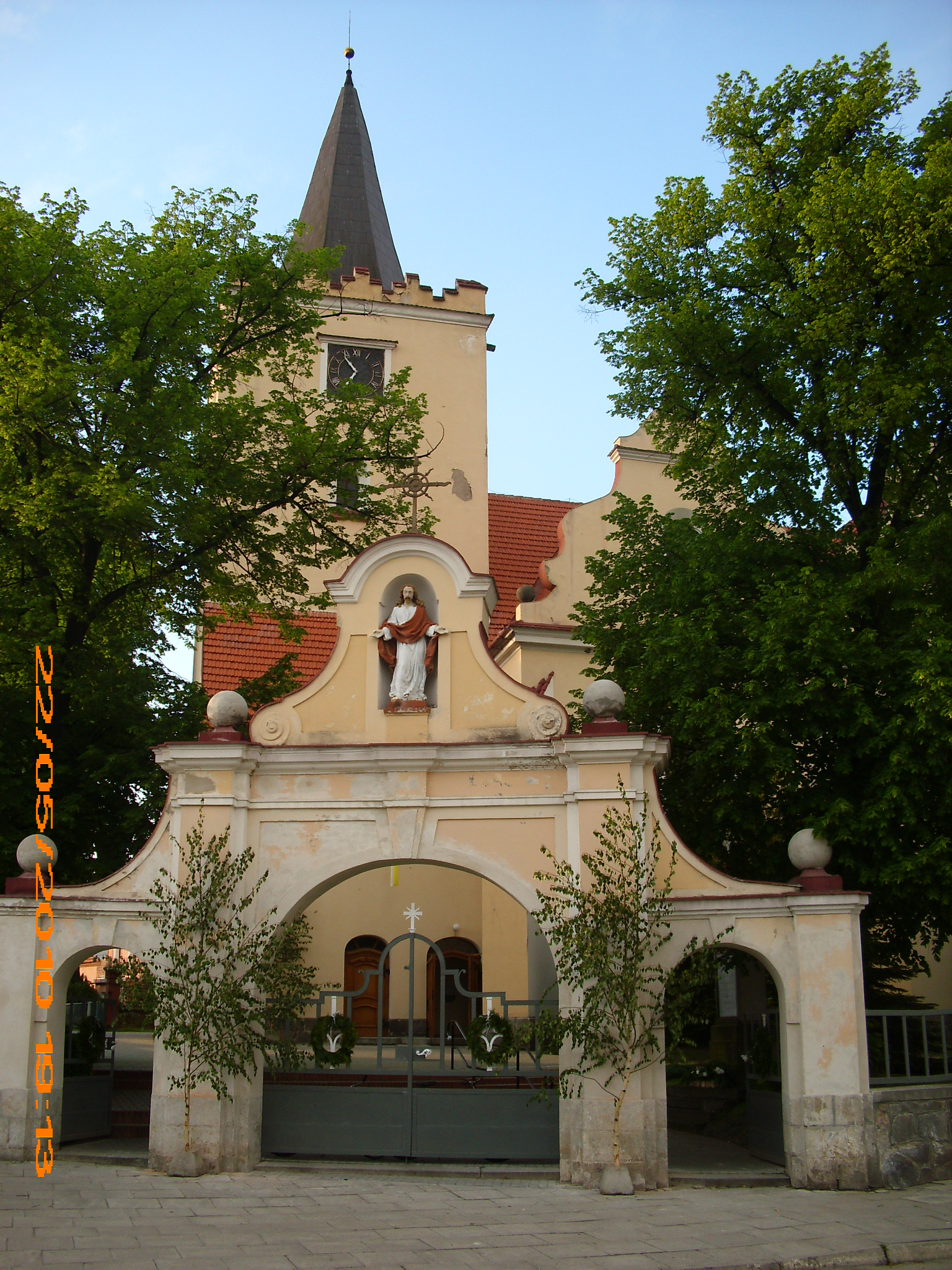 Złotogłowice - kosciół brama główna